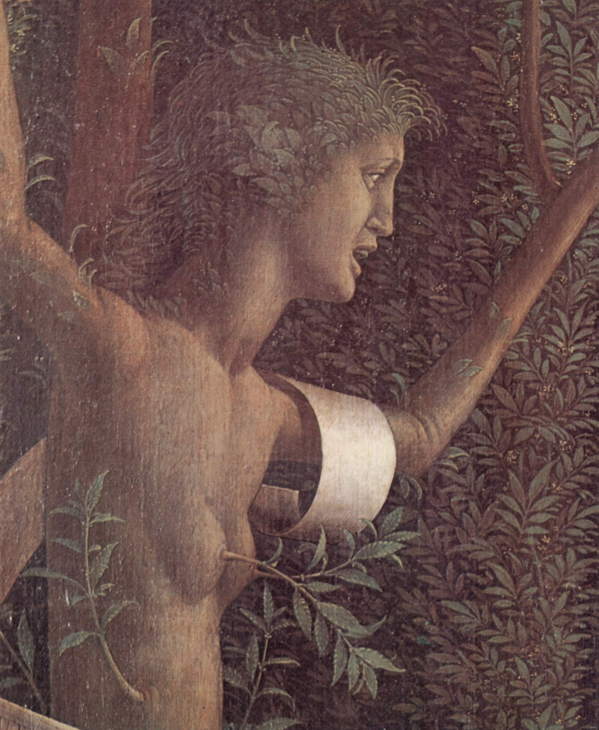 detail